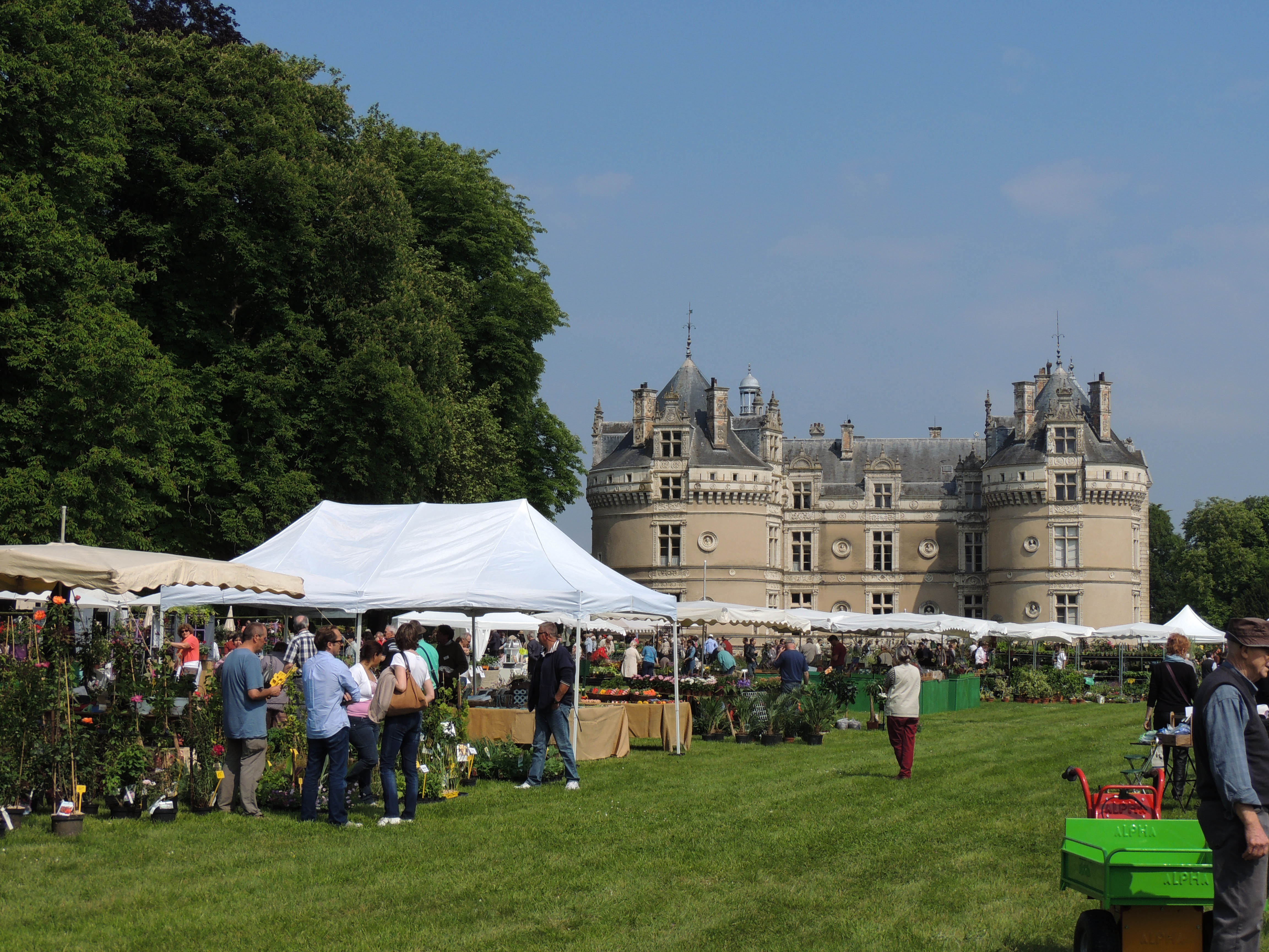 Le château du Lude lors de la fête des jardiniers en juin 2013. Les exposants sont installés sur la grande terrasse.